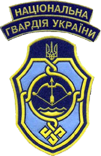 Нарукавний знак, 3 Південна дивізія НГУ